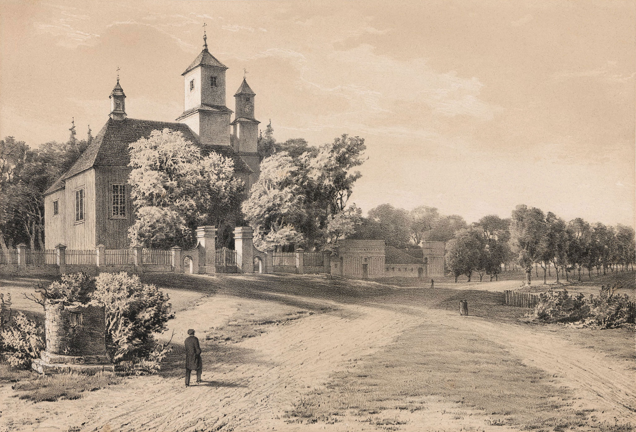 Беларуская (тарашкевіца): Сьвіслач (Śvisłač), рог вуліц Дворнай (vulica Dvornaja) і Берасьцейскай (vulica Bieraściejskaja). Касьцёл